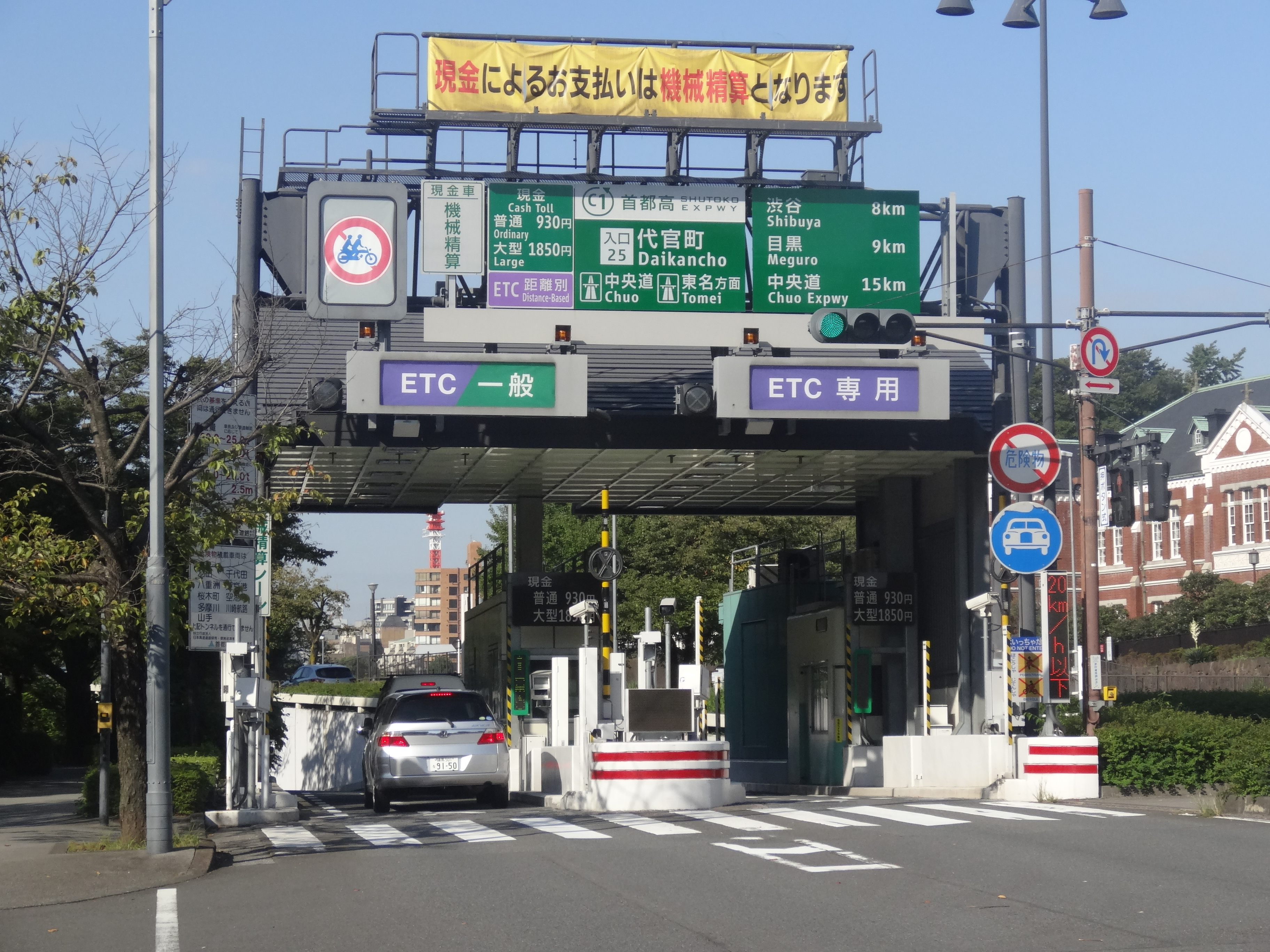 代官町入口